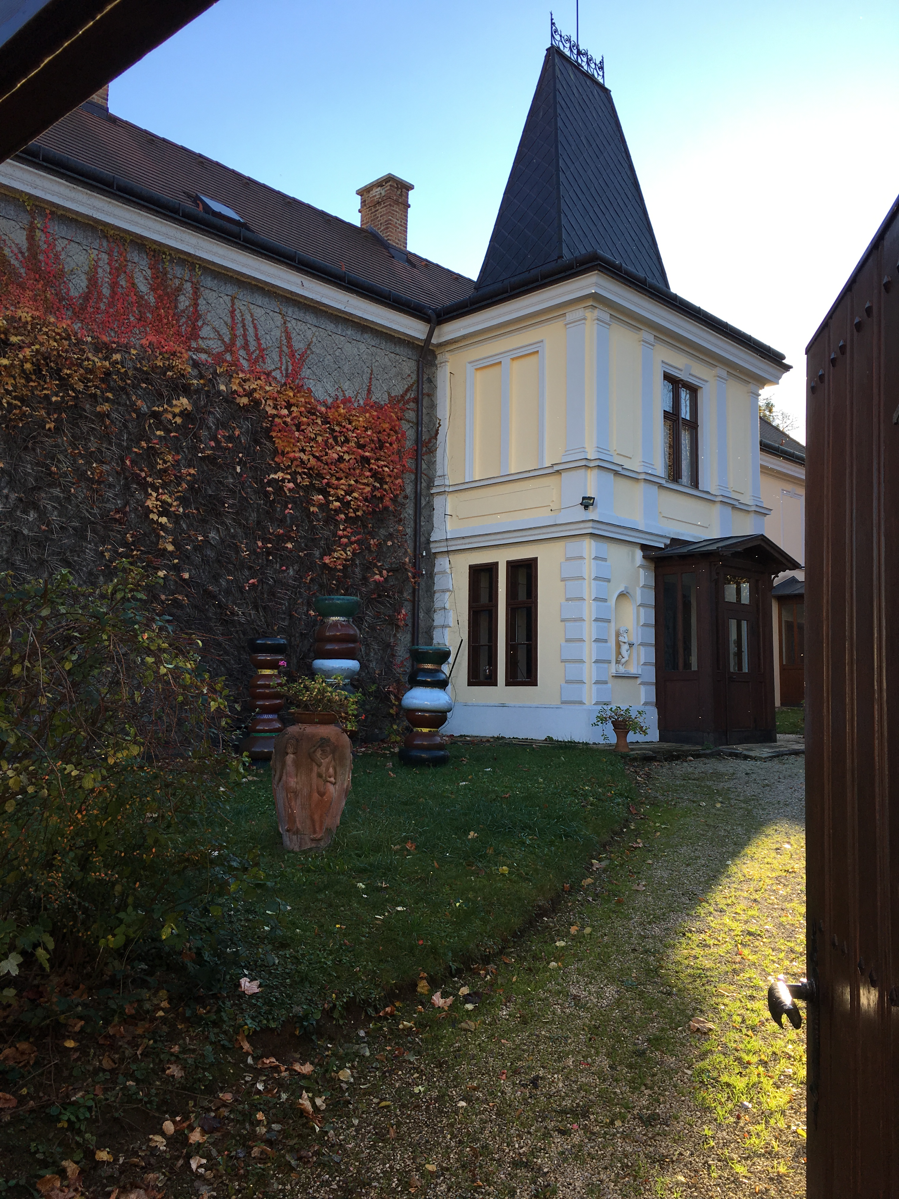 Steghof innen